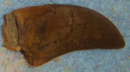 Fossil of Megalosaurus, an extinct theropod- Took the photo at Fossil Show, Munich